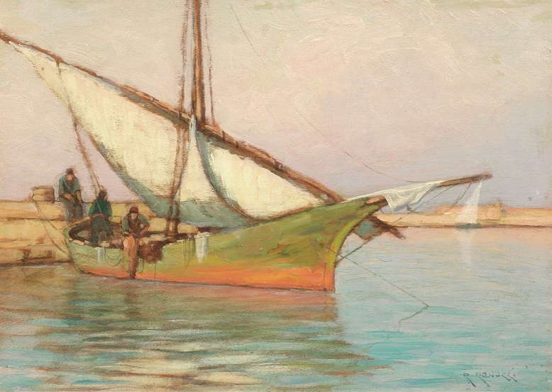 Barca al molo, olio su compensato, cm 28 x 38,5, firmato, coll. privata